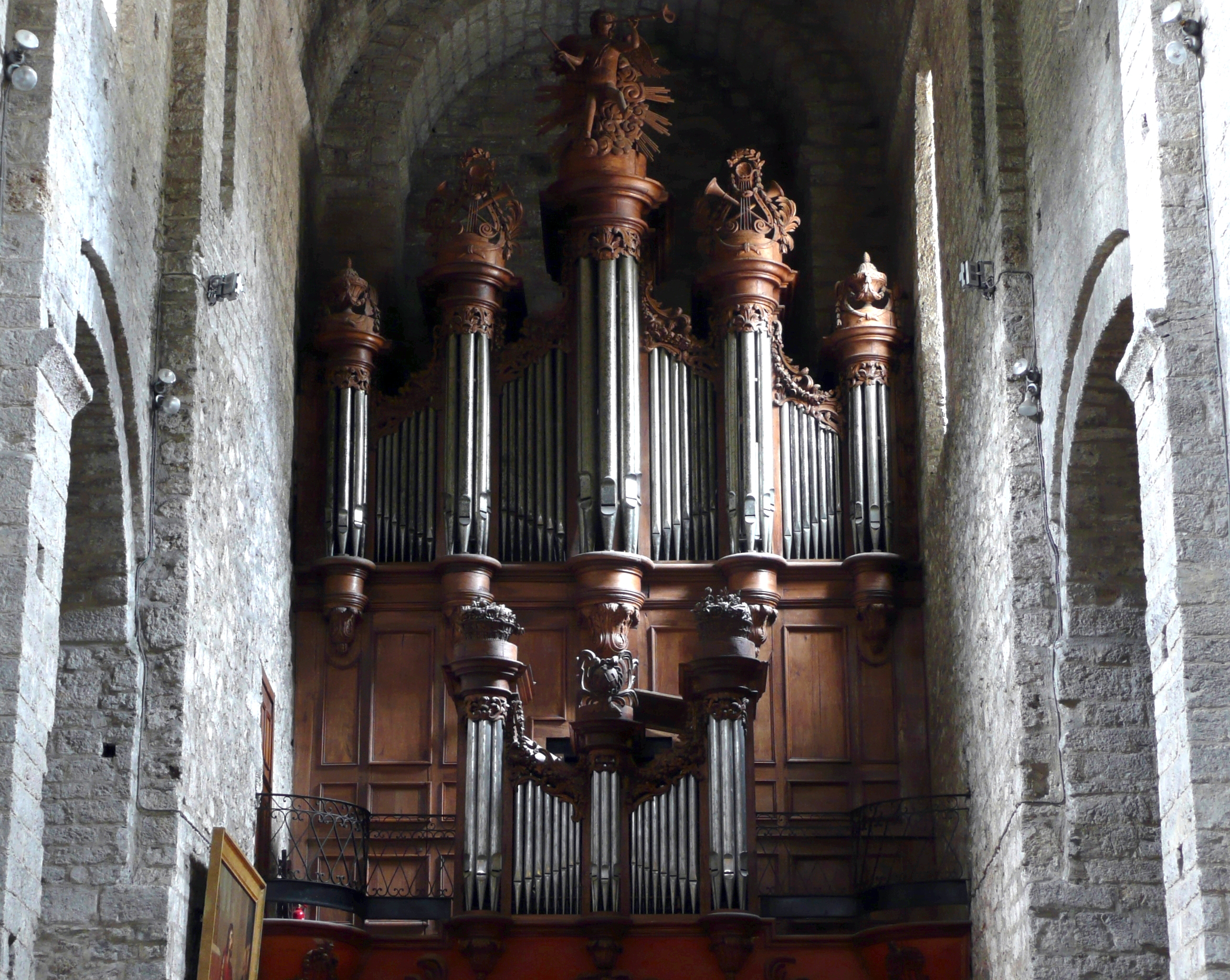 Saint-Guilhem-le-Désert (Hérault, France), abbaye de Gellone: une des 7 Merveilles Organistiques de l'Hérault (avec Béziers, Lodève, Montpellier St Pierre & N.D.des Tables, Pézenas, St Pons de Thomières), construite en 1789 par Jean-Pierre Cavaillé, grand-père du célèbre Aristide.